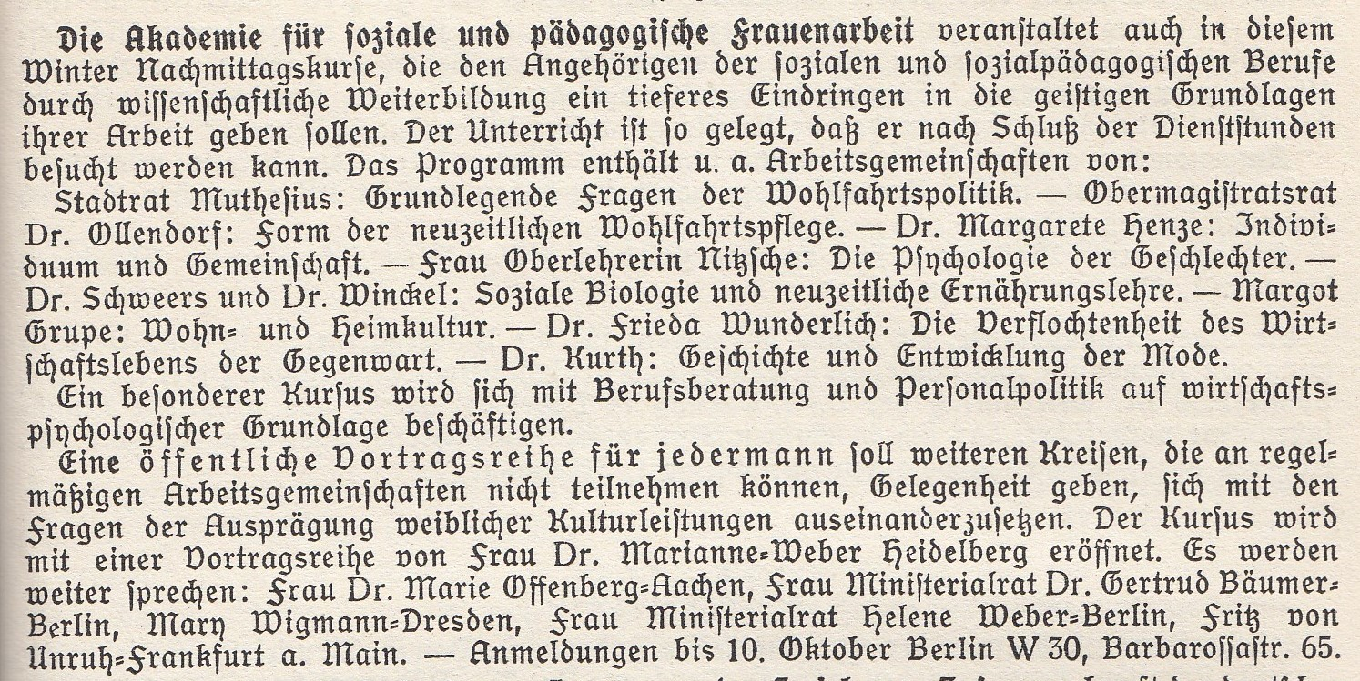 Werbung für Kurs an der Akademie für soziale und pädagogische Frauenarbeit